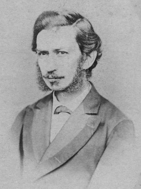 El escritor, músico y político ecuatoriano Juan León Mera en 1870